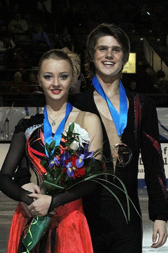 Александра Стапанова и Иван Букин на финале Гран-при среди юниоров сезона 2011-2012